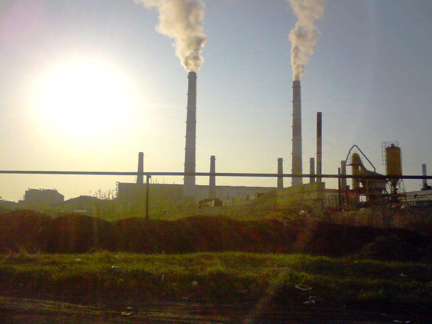 Вид на Красногорскую ТЭЦ